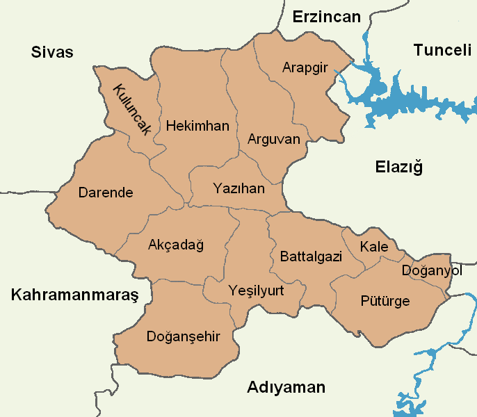 Malatya'nın ilçelerini gösteren harita